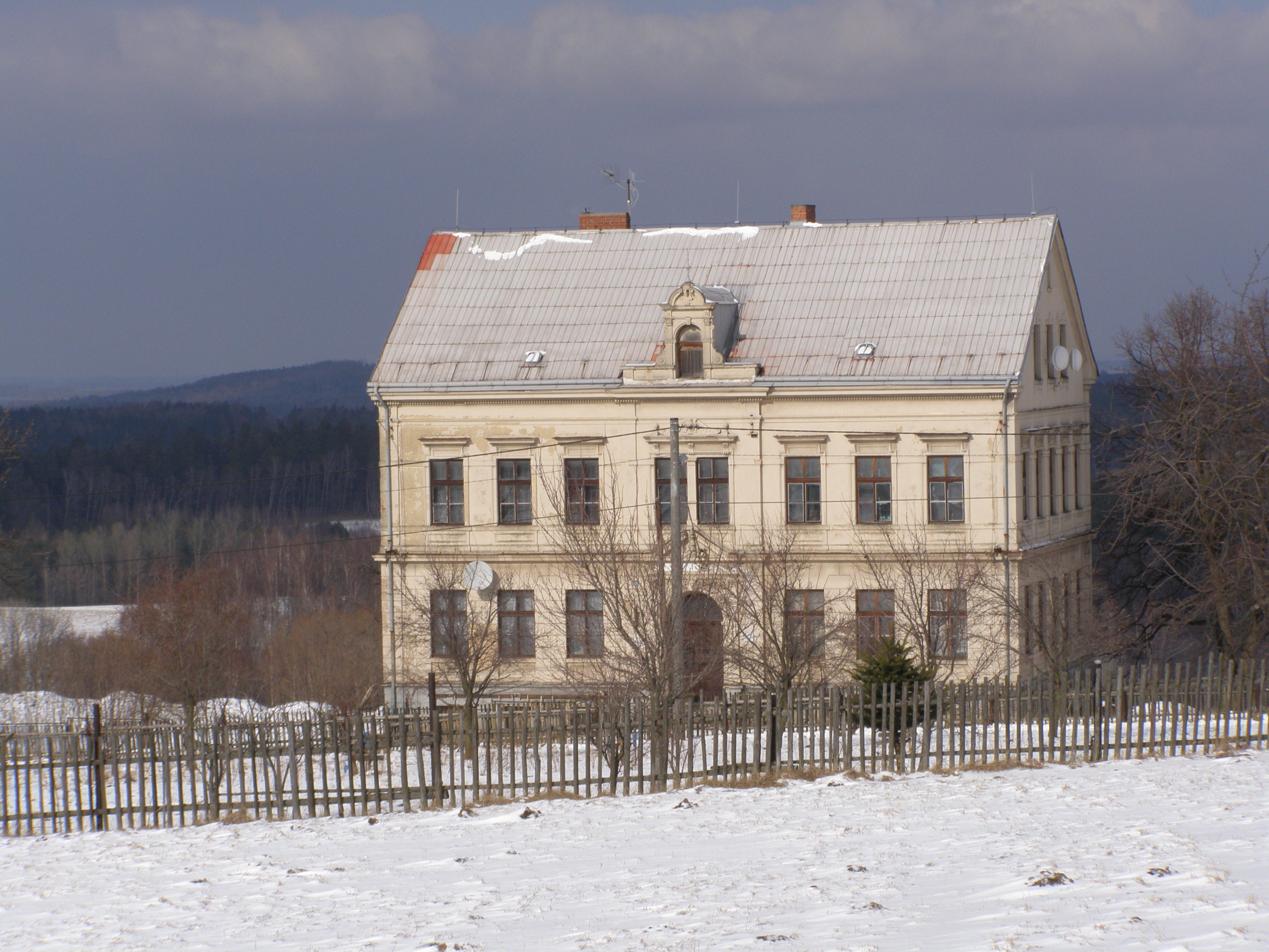 Frýdlant, osada Údolí, bývalá škola, pohled ze severního úbočí kopce U Rozhledny (399 m)